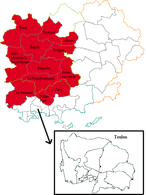 Sixième circonscription législative du département du Var (France)